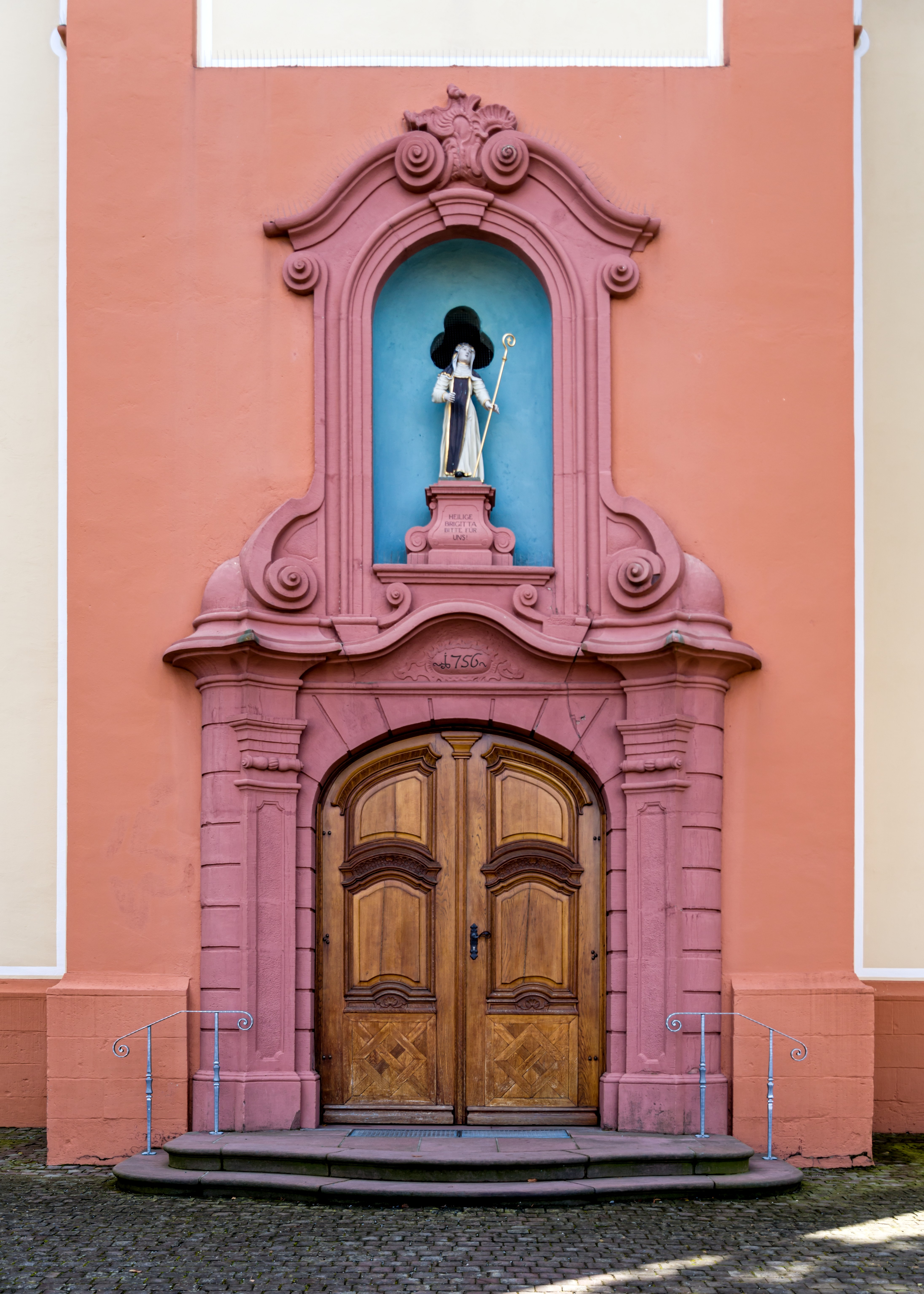 St. Brigitta Niederschopfheim, Hohberg